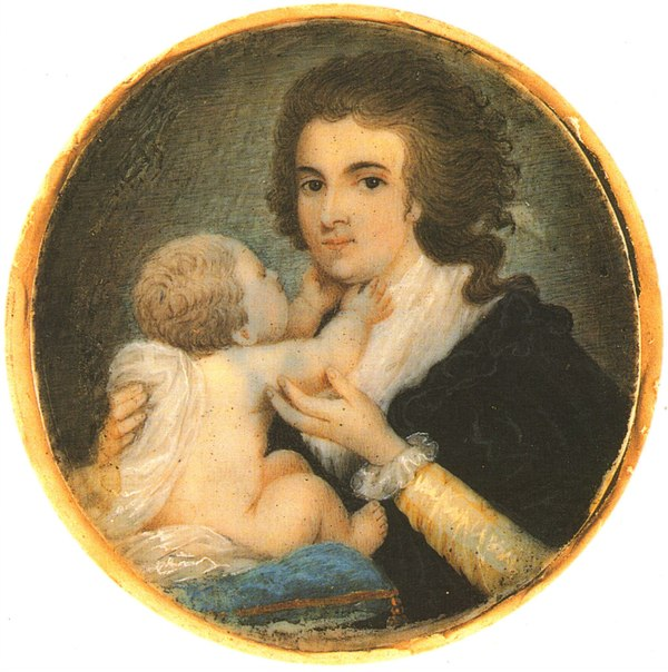 Princess Varvara Nikolayevna Gagarina, nee Galitzine (1762-1802)